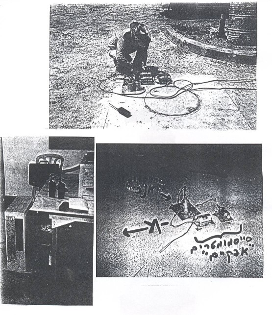 Seismometers Station for Spectra Analysis